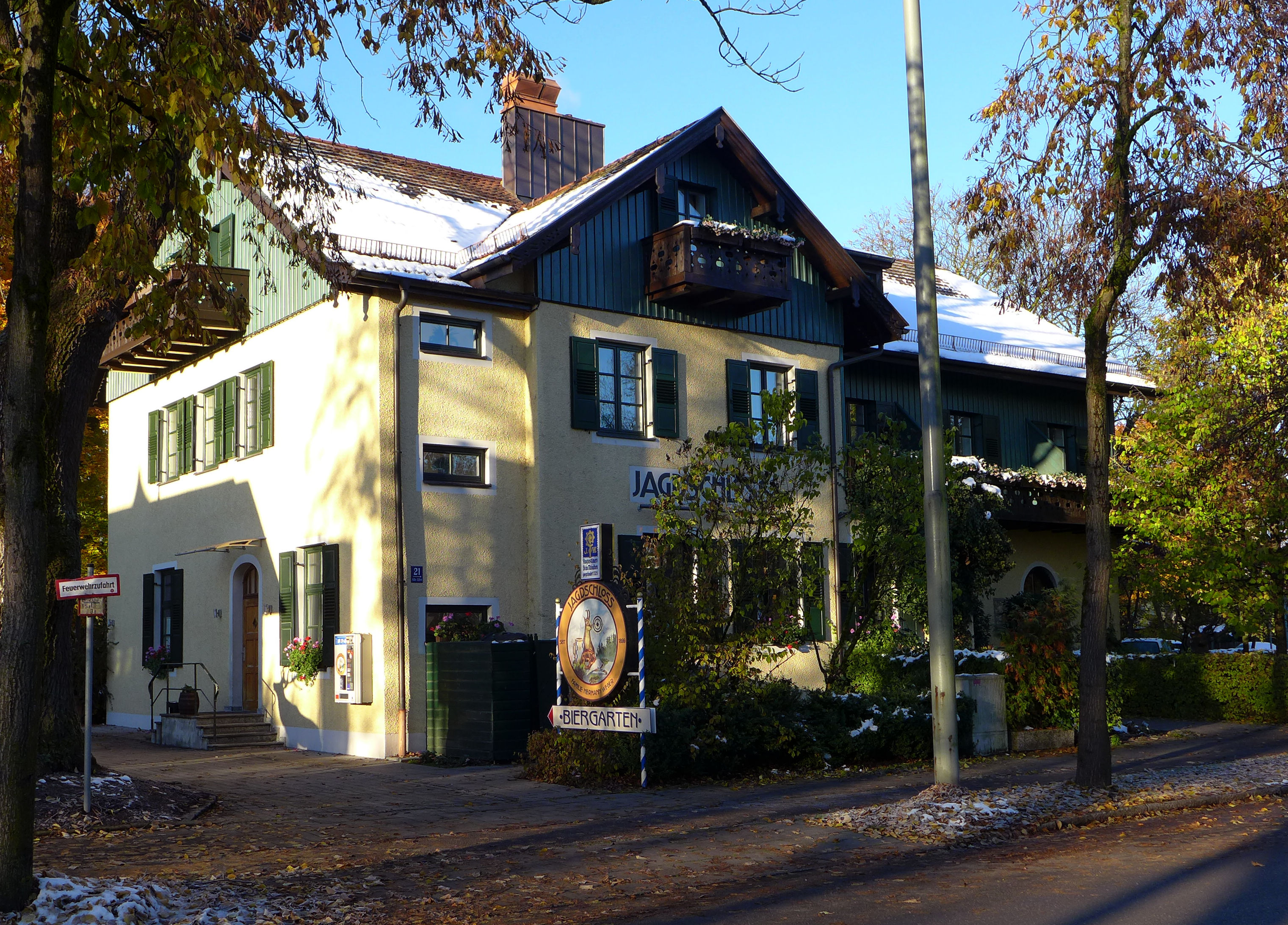 Alte Allee 21, München